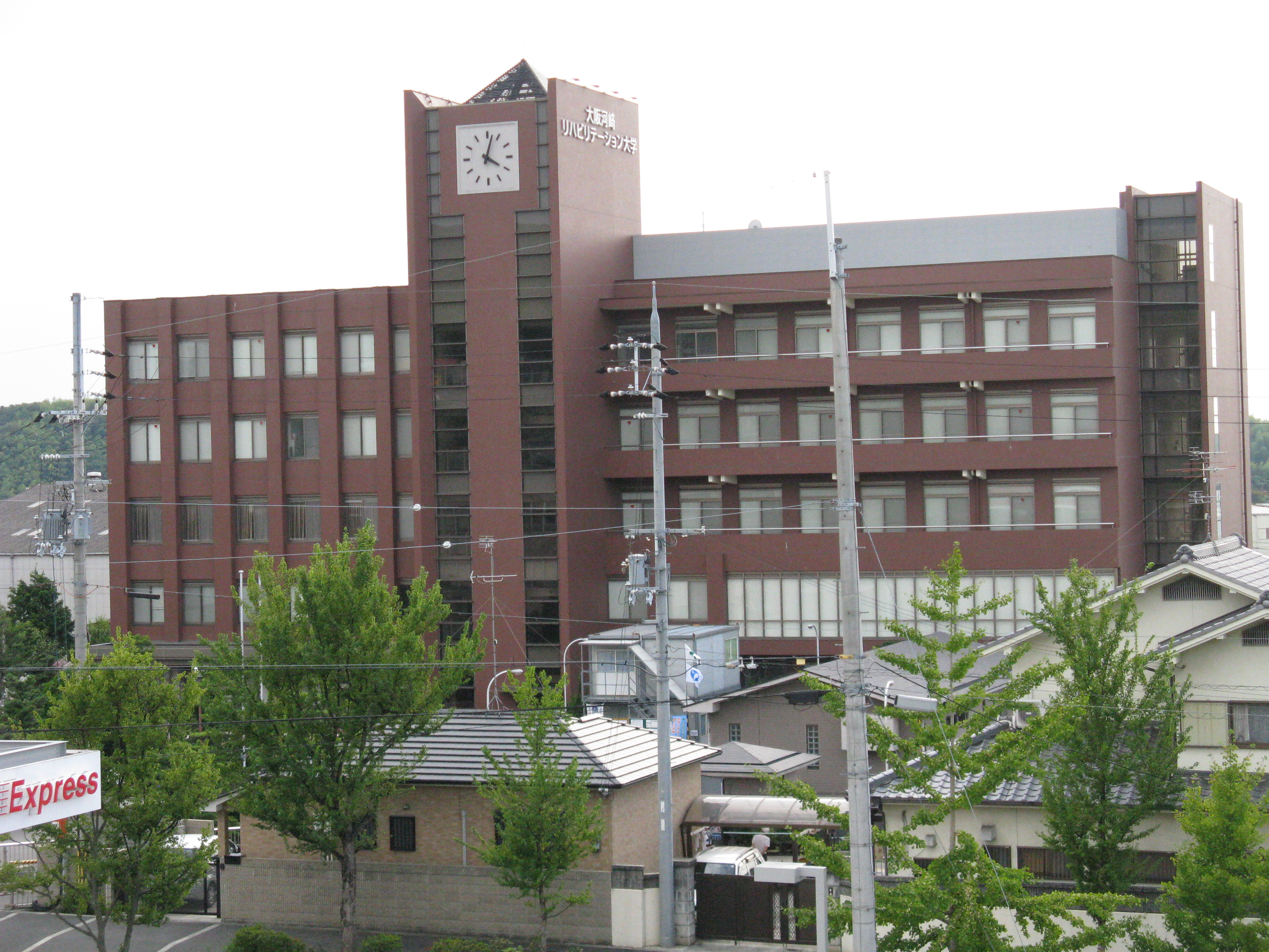 大阪河崎リハビリテーション大学